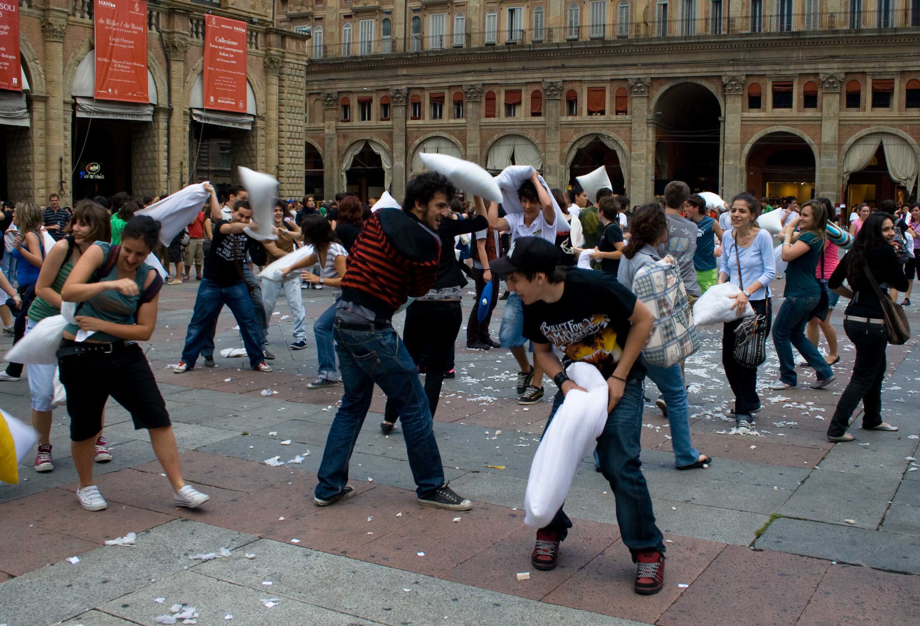 Pillow fight, Piazza Maggiore, Bologna, Italy.